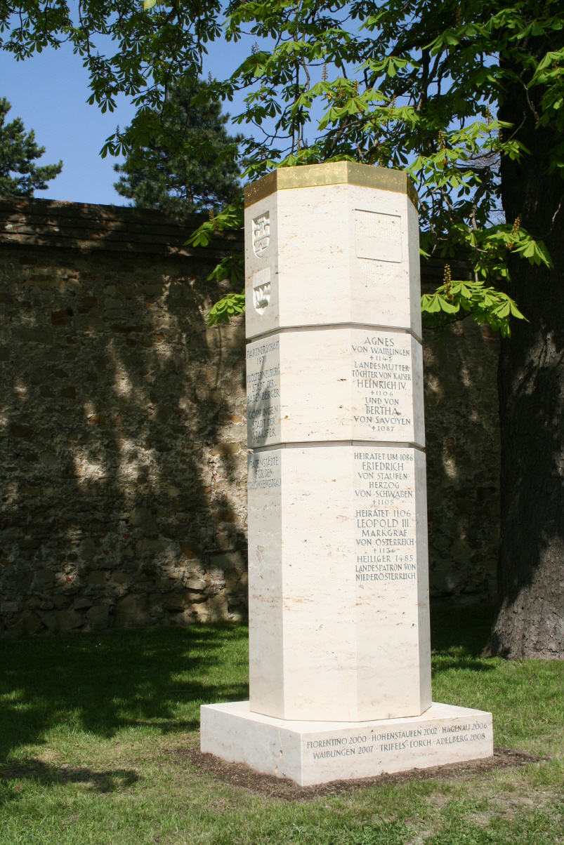 Klosterneuburg - Stauferstele am Nordportal des Stifts auf dem Hohenstaufenplatz